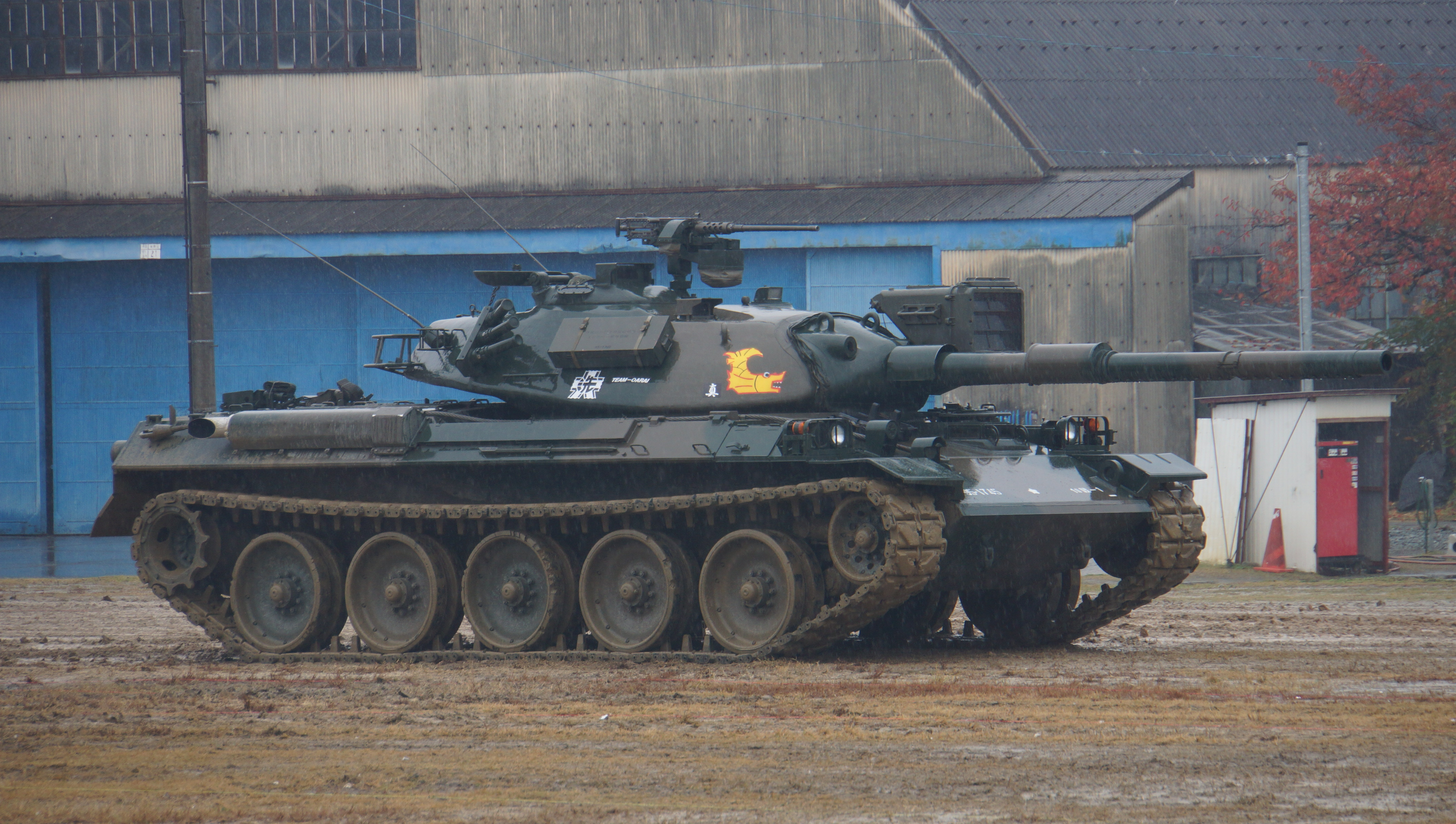 アニメ「ガールズ＆パンツァー」劇中に登場する”大洗女子学園”エンブレムを纏った陸上自衛隊 74式戦車（95-1745号車）。2014年11月9日 今津駐屯地にて。